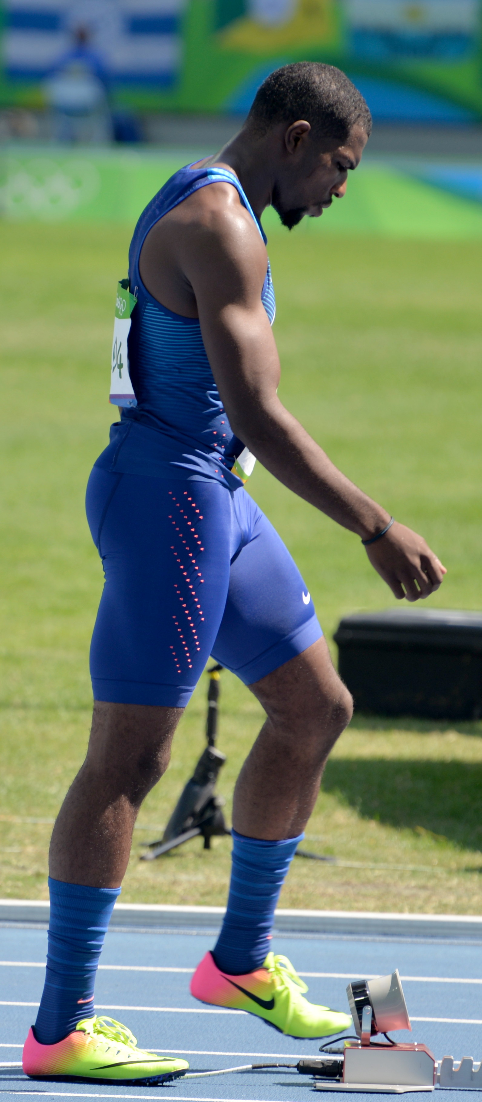 Séries du 200m Homme aux JO de Rio 2016